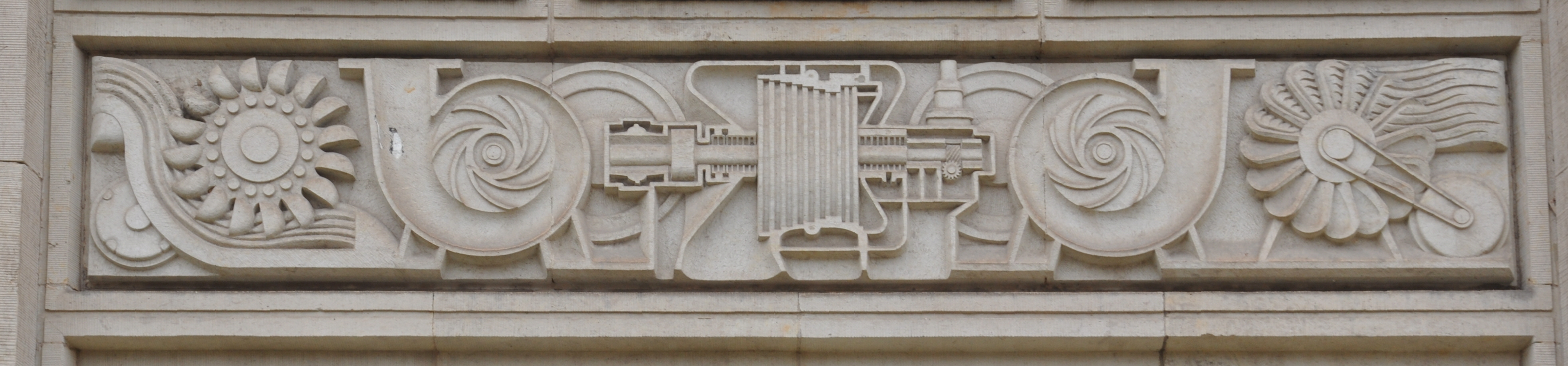 Dresden, Technische Universität (TU) Merkel-Bau, Relief über der Einfahrt